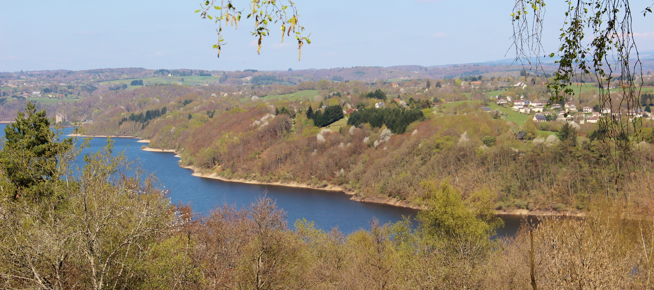 Le lac de Bort les Orgues (Corrèze) et le château de Val au loin à gauche au bord de l'eau